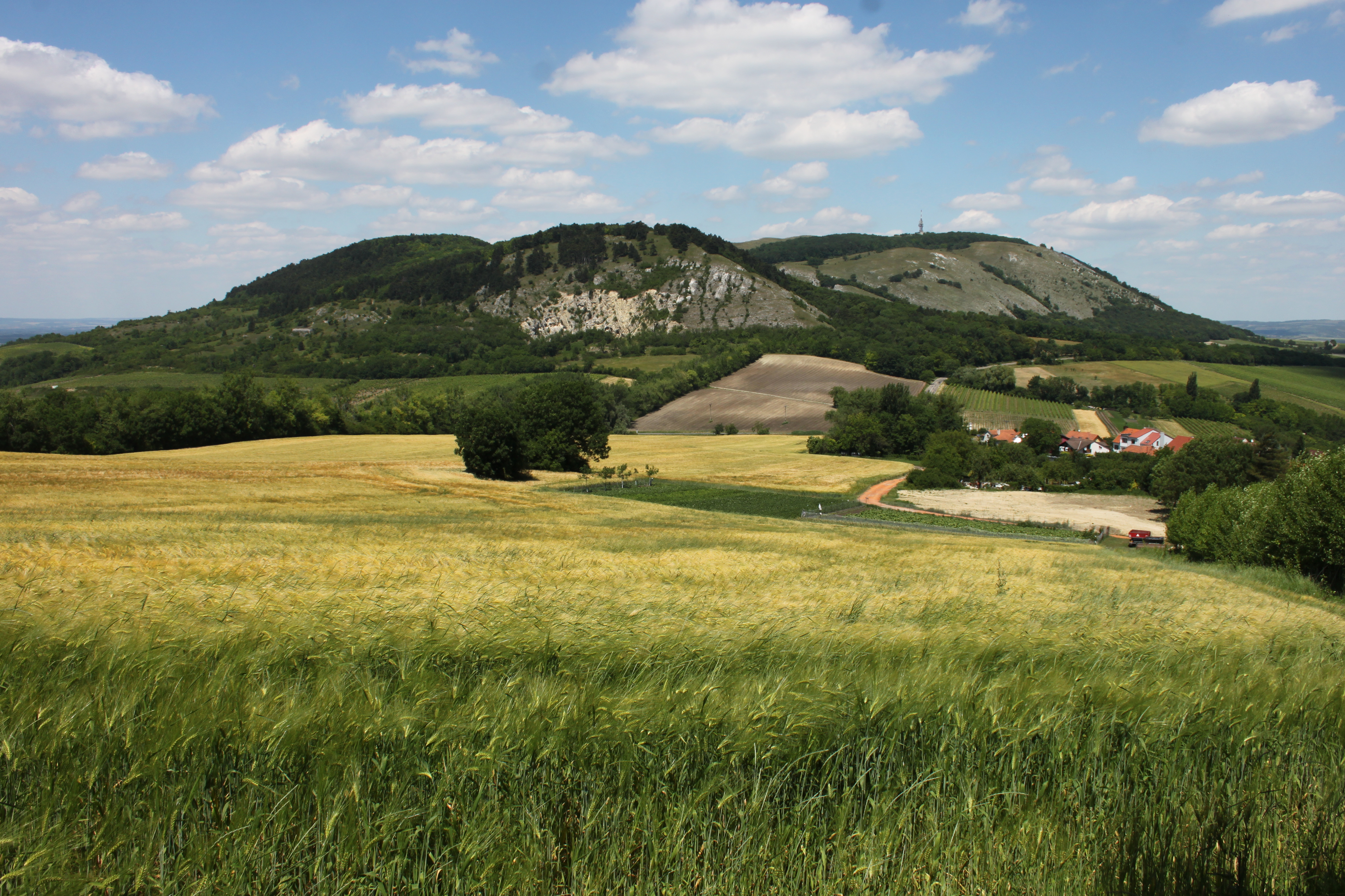 Pohled na severní část Pálavy od Sirotčího hradu